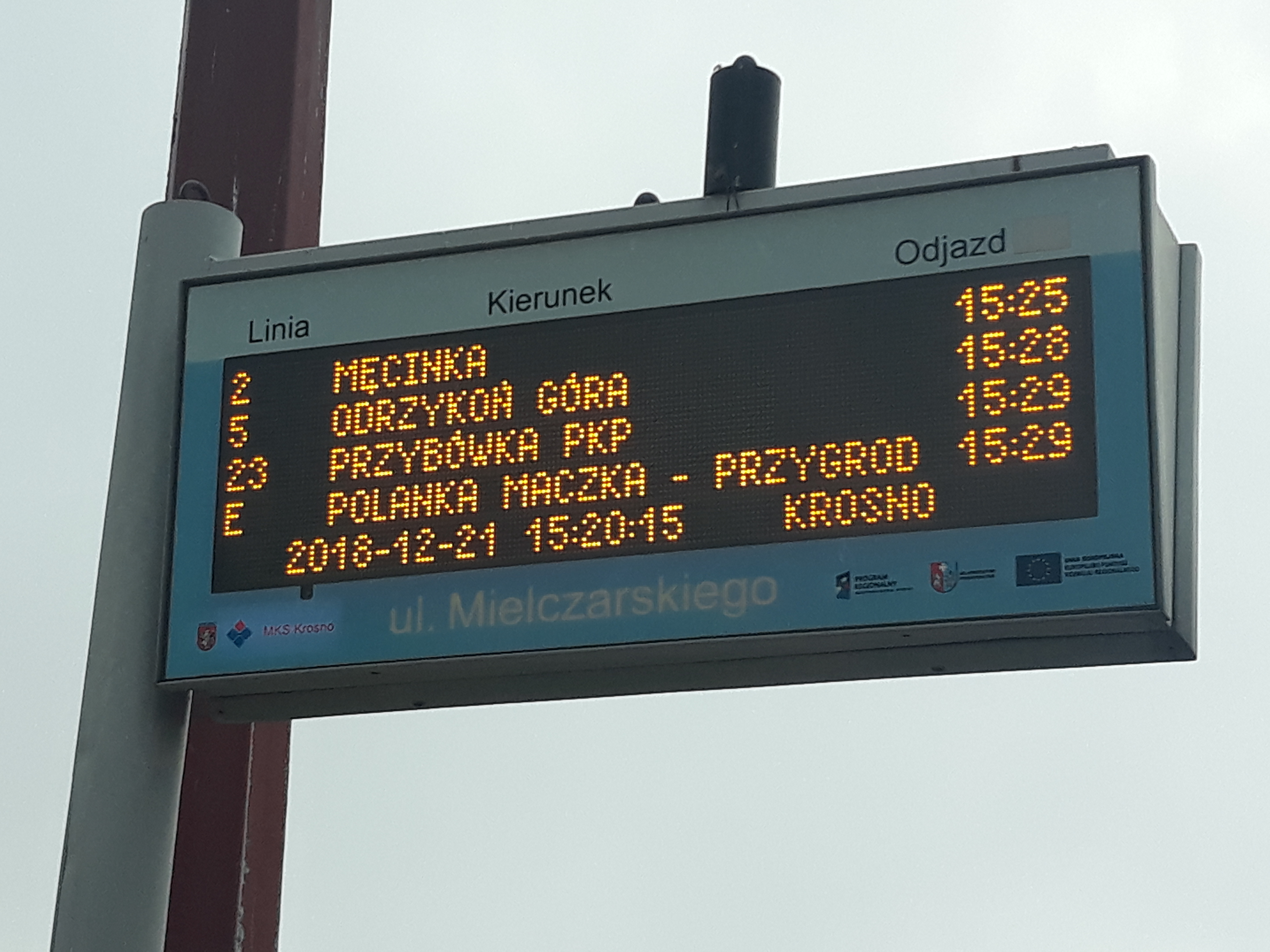 Tablica elektroniczna z rozkładem jazdy MKS Krosno - przystanek Mielczarskiego Dworzec